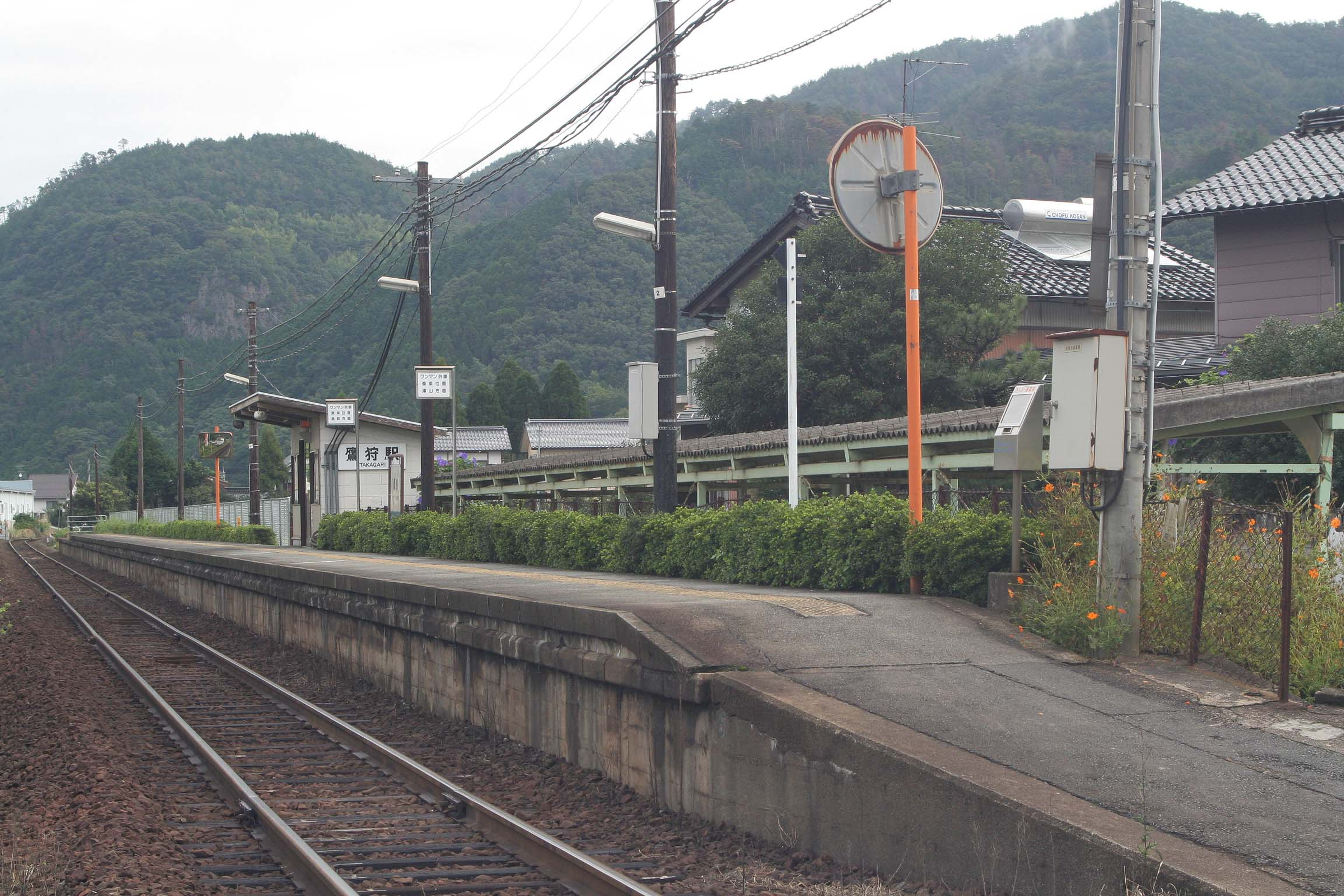 西日本旅客鉄道 因美線 鷹狩駅構内